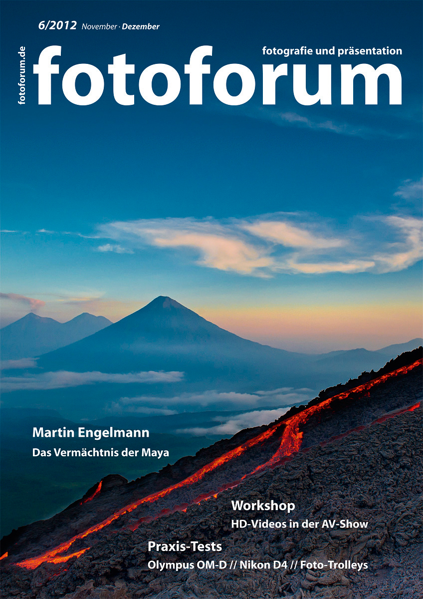 Cover der fotoforum Ausgabe 6/2012